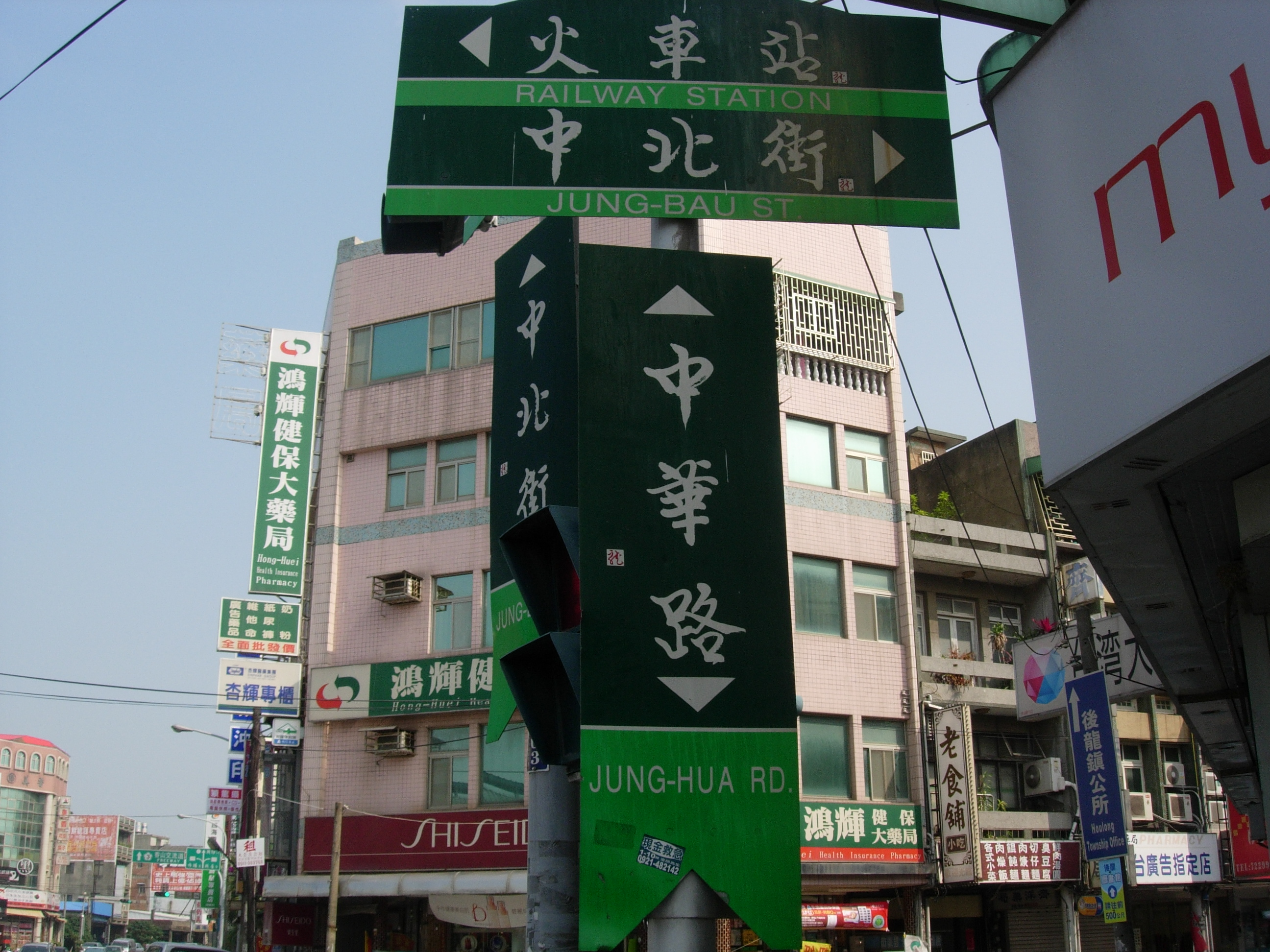 中文（台灣）: 後龍特色路牌